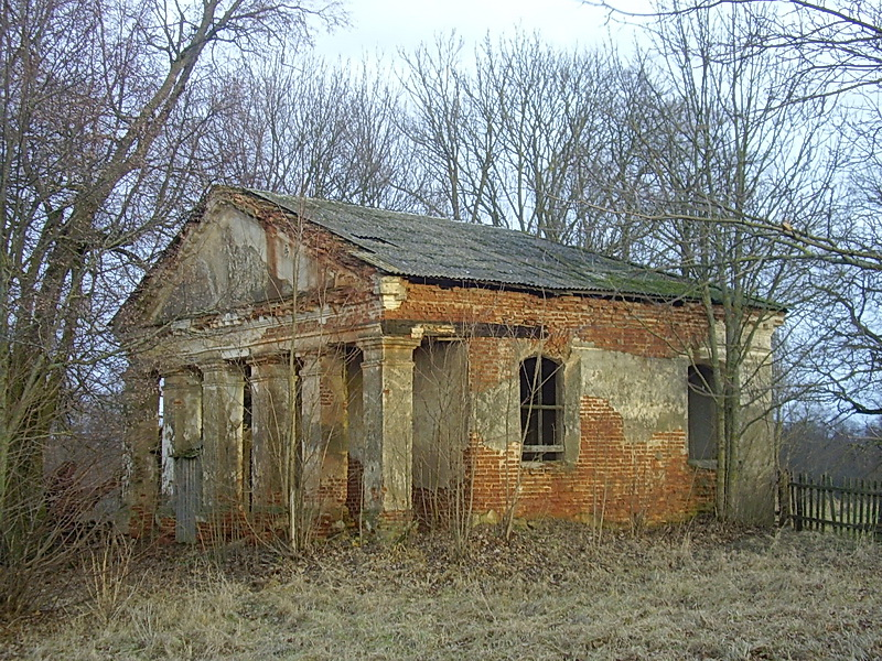 Завушша. Сядзіба Мараўскіх. Капліца-пахавальня